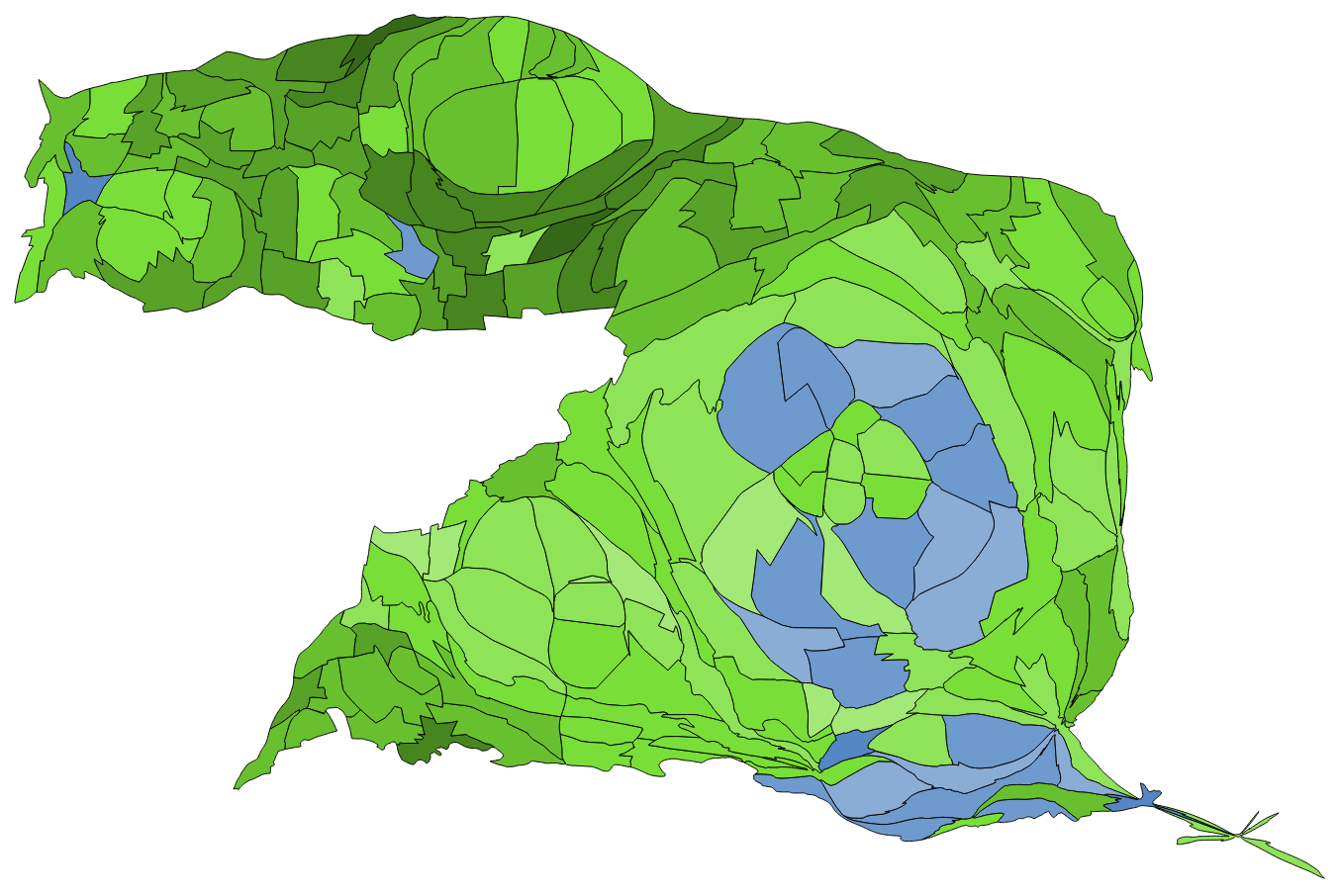 顏色對照表